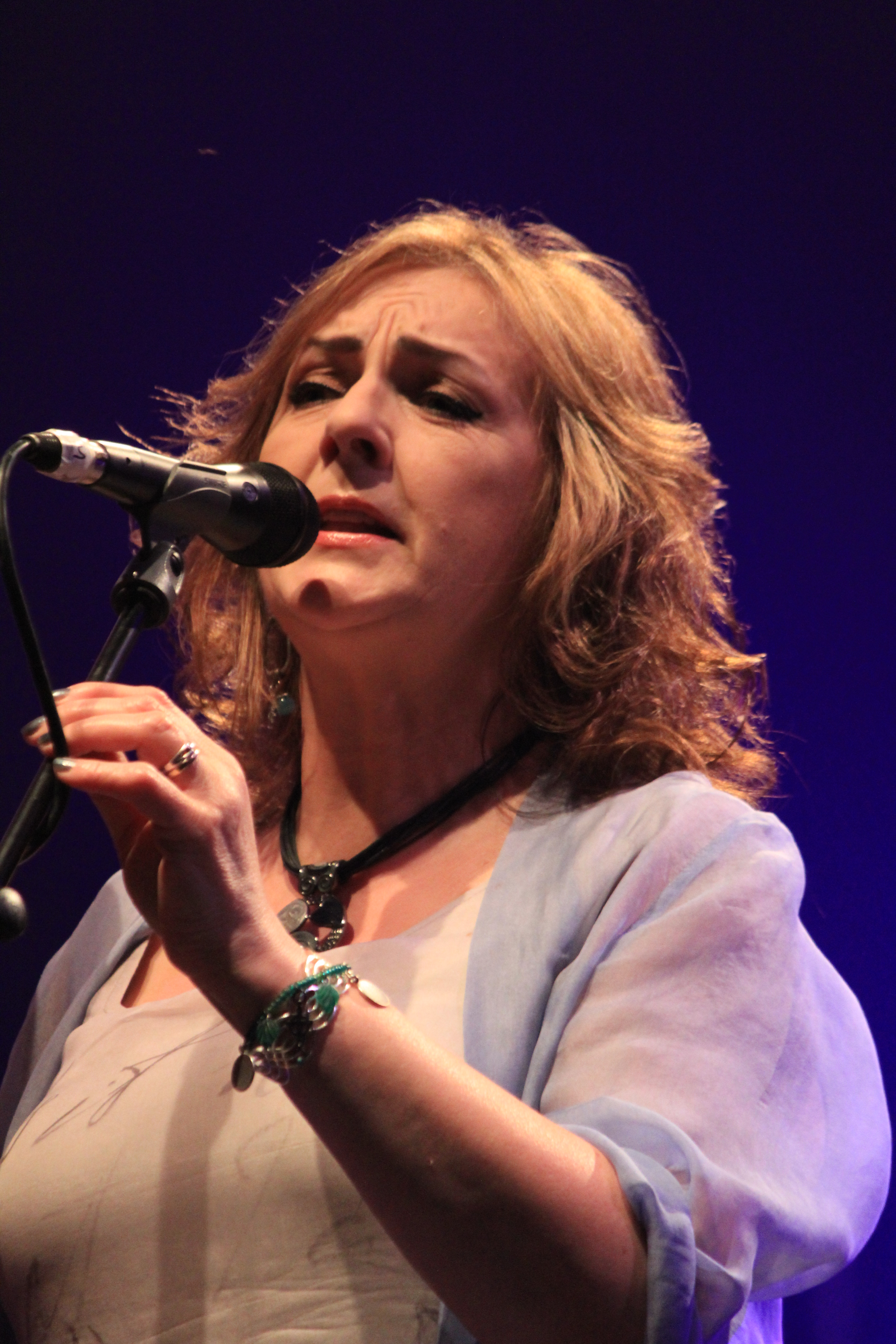 Moya Brennan pendant le concert de Clannad lors du festival interceltique de Lorient 2013